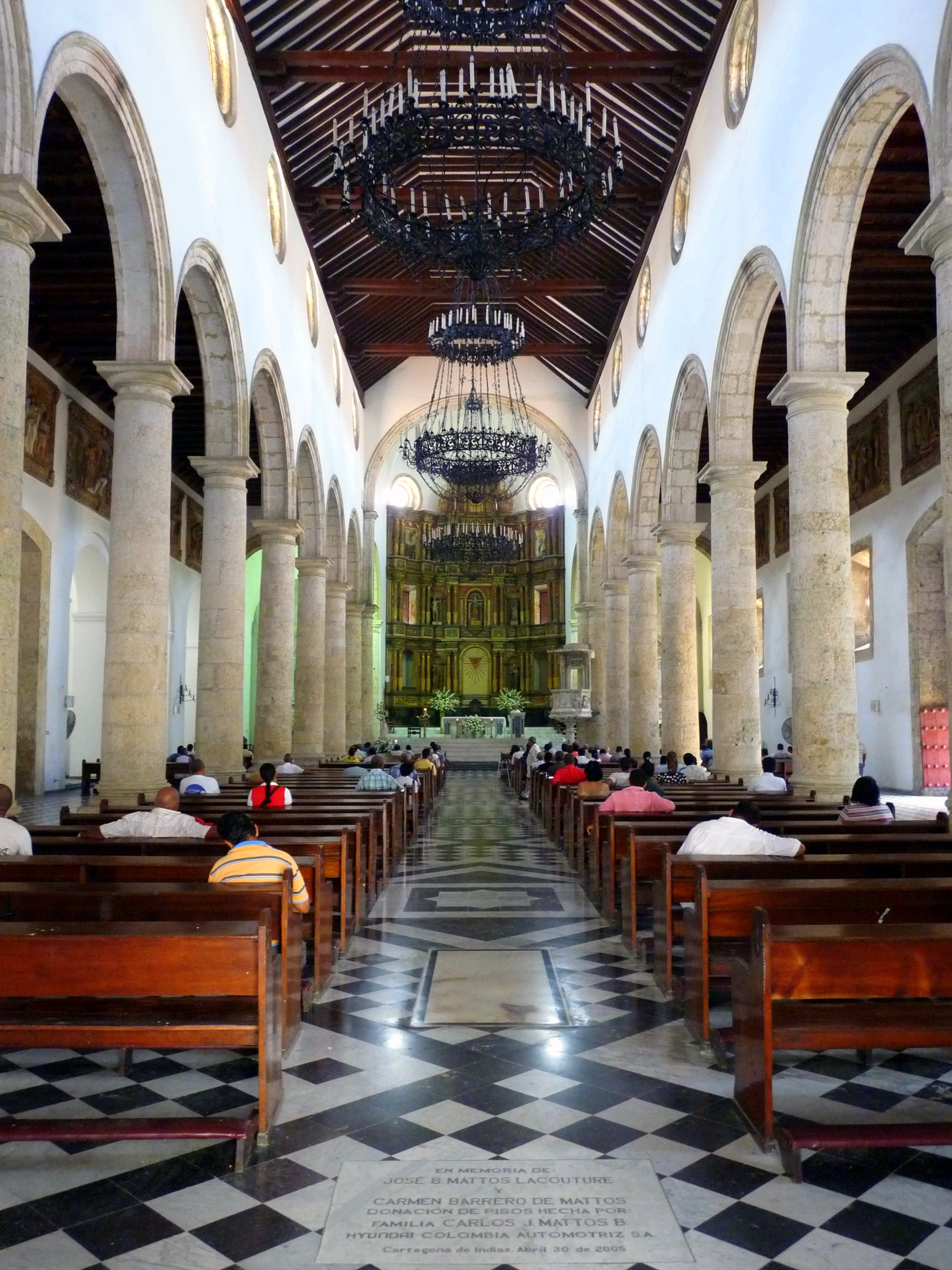 Nave central de la Catedral de Cartagena de Indias. Colombia.